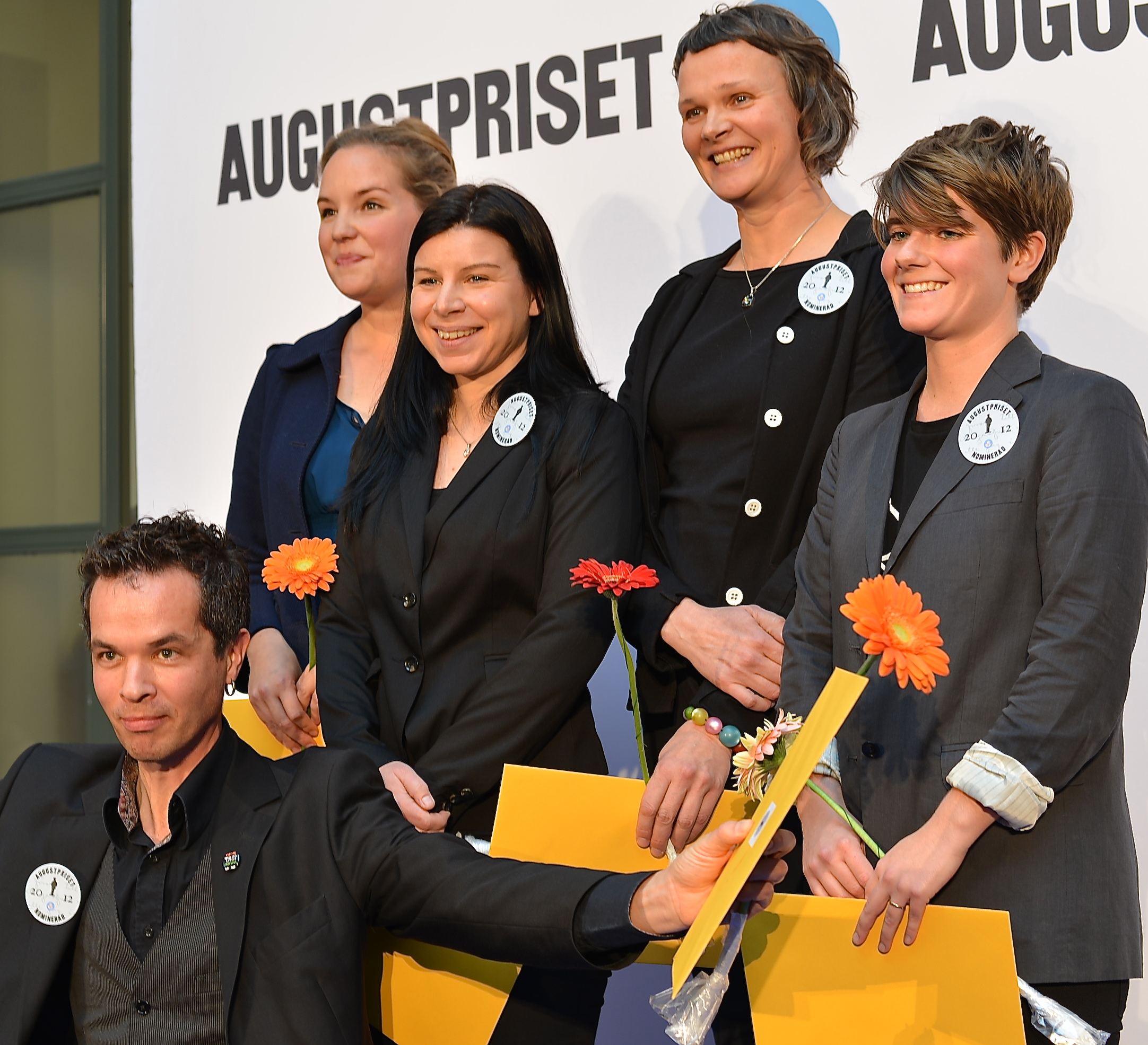 Augustprisnominerade i barn- och ungdomsklassen 2012